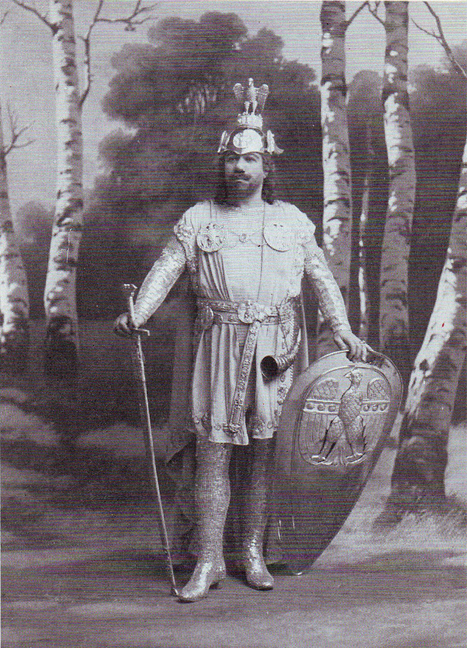 El tenor español Francisco Viñas como Lohengrin